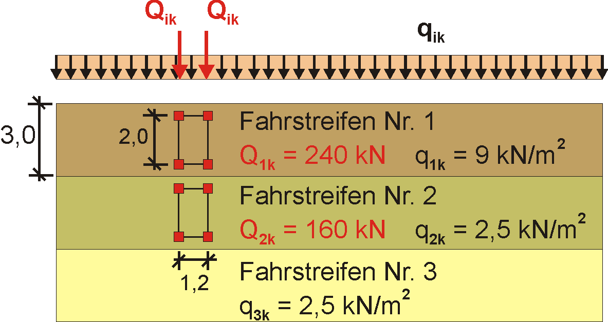 Lastmodell 1 für Strassenbrücken des DIN-Fachberichtes 101